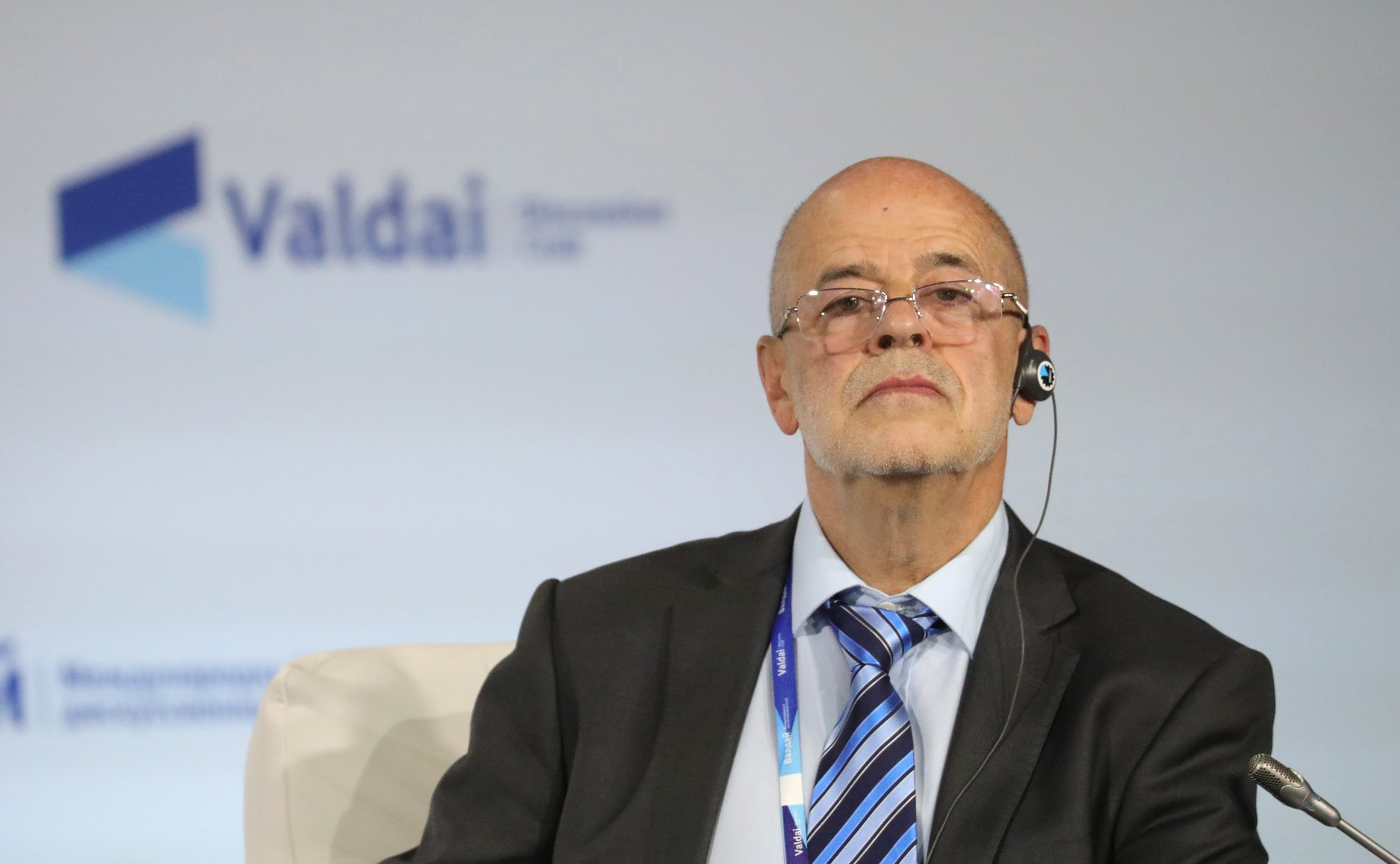 Заседание дискуссионного клуба «Валдай».